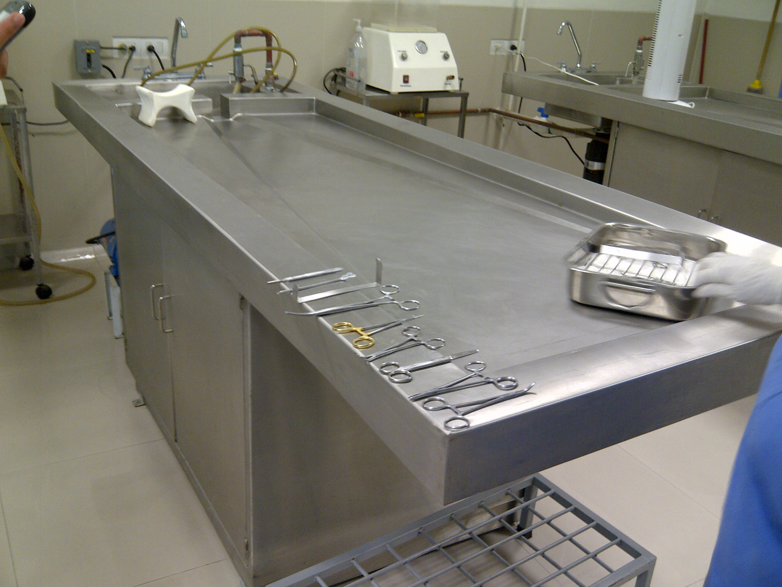 plancha o mesa quirúrgica... Un área de 5x6 metros (30 mts2)